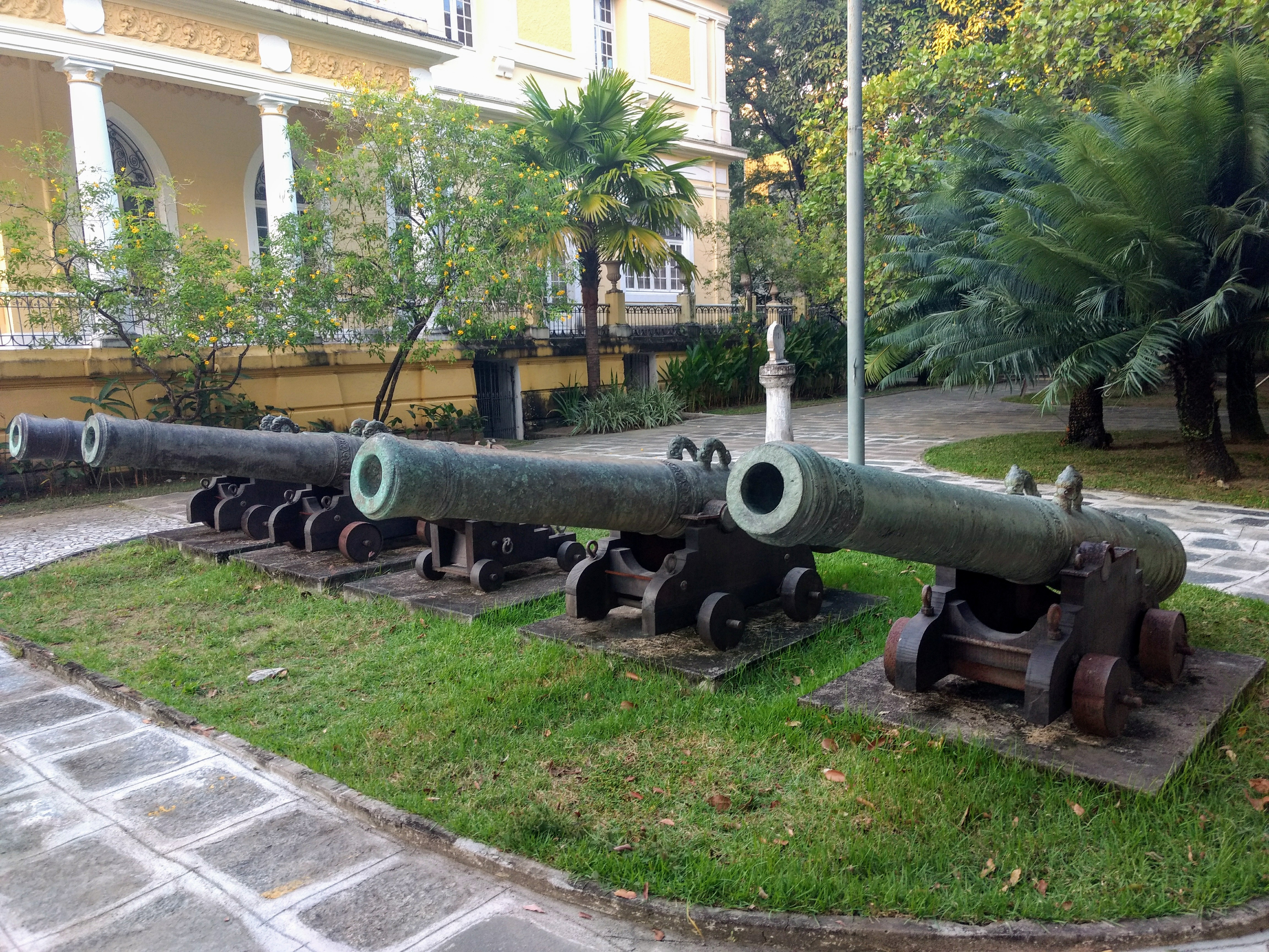 Recife, Brasil. Jardim do Museu do Estado de Pernambuco MEP.